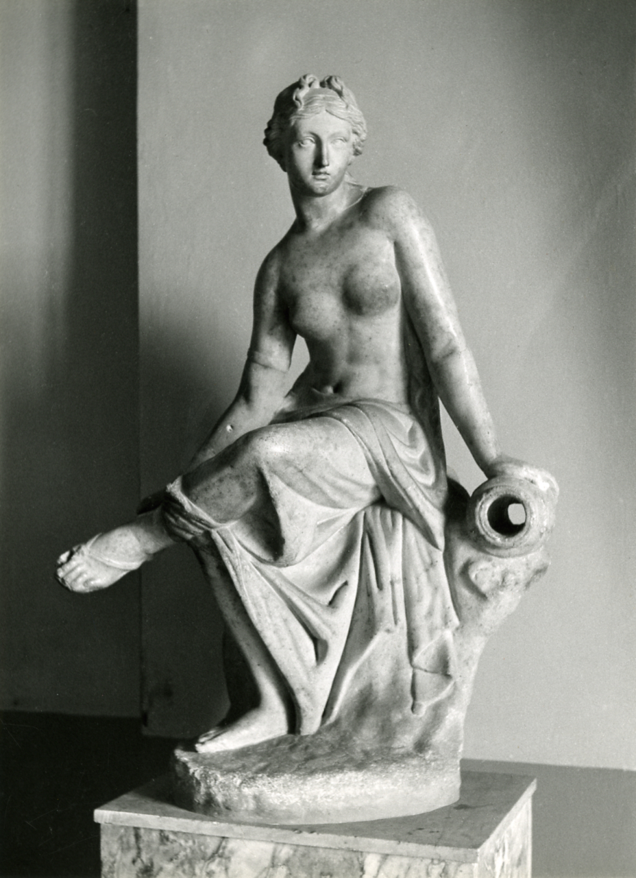 Servizio fotografico : Napoli, 1969 / Paolo Monti. - Stampe: 2 : Positivo b/n, gelatina bromuro d'argento/ carta, 24x30. - ((Sul coperchio della scatola iscrizione didascalica manoscritta a pennarello nero: "Scultura Moderna". - Occasione: Documentazione del nuovo allestimento del Museo Archeologico Nazionale. - Fonte: Agenda di Paolo Monti: Monti - Agenda 1969 (1969), presso Archivio Paolo Monti. Statuetta di Ninfa per Fontana seduta su una roccia. Bibliografia: Carrella, Anna, Lucia Anna D’Acunto, Nadia Inserra, et Colomba Serpe. Marmora pompeiana nel Museo archeologico nazionale di Napoli: gli arredi scultorei delle case pompeiane. 1 vol. Studi della Soprintendenza archeologica di Pompei 26. Napoli: Electa Napoli, 2008, p. 210-211.